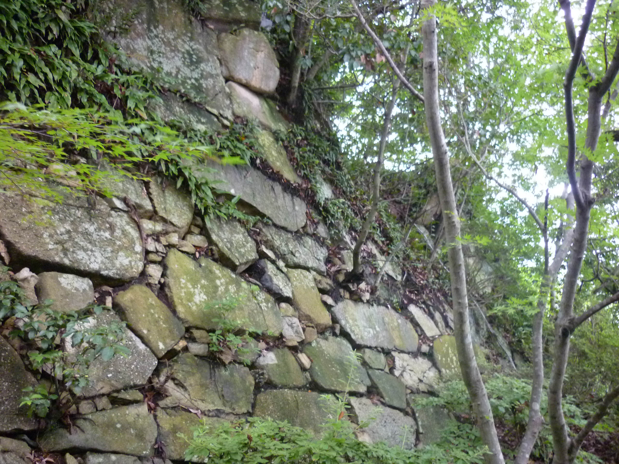 本丸虎口櫓下の石垣